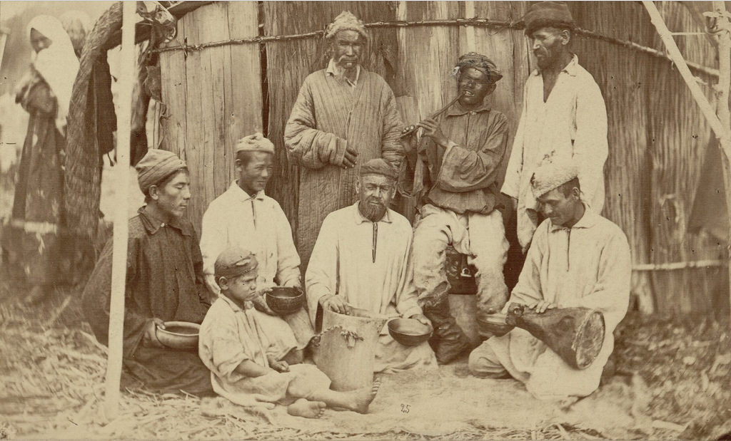 1870-е. Снимок Карла Андреевича Фишера. Башкиры Оренбуржья